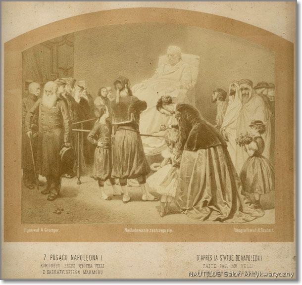 Z posągu Napoleona I robionego przez Włocha Velli (według rysunku A. Grottgera), ok. 1870-1880 Reprodukcja fotograficzna; wym.: 20,5 x 25,5 cm; sygn. l.d. suchy tłok A. Szubert, fotograf w Krakowie. Poniżej zdjęcia nadrukowywane opisy.